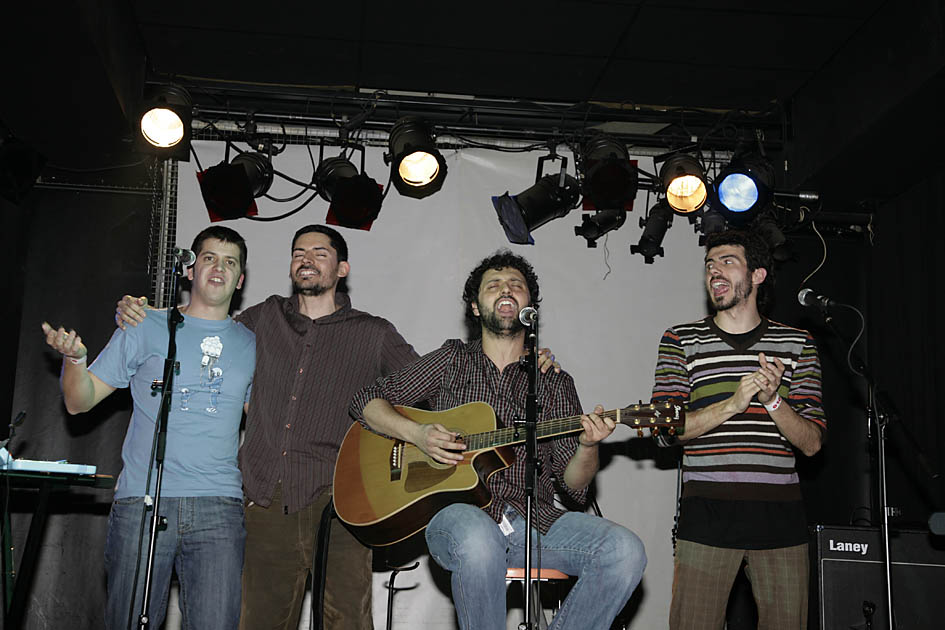 Actuació dels Amics de les Arts